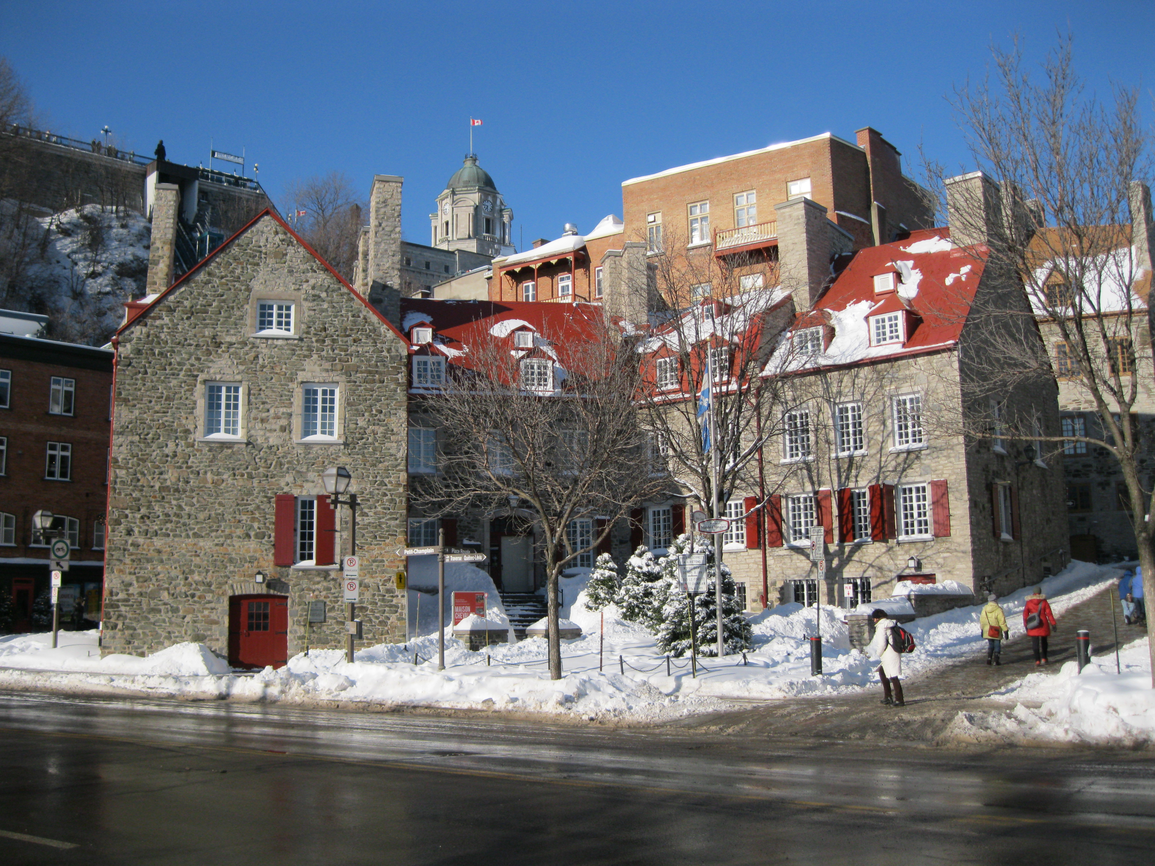 Maison Jean-Baptiste-Chevalier, 5, Rue du Cul-de-Sac, Québec, Québec, G1K, Canada